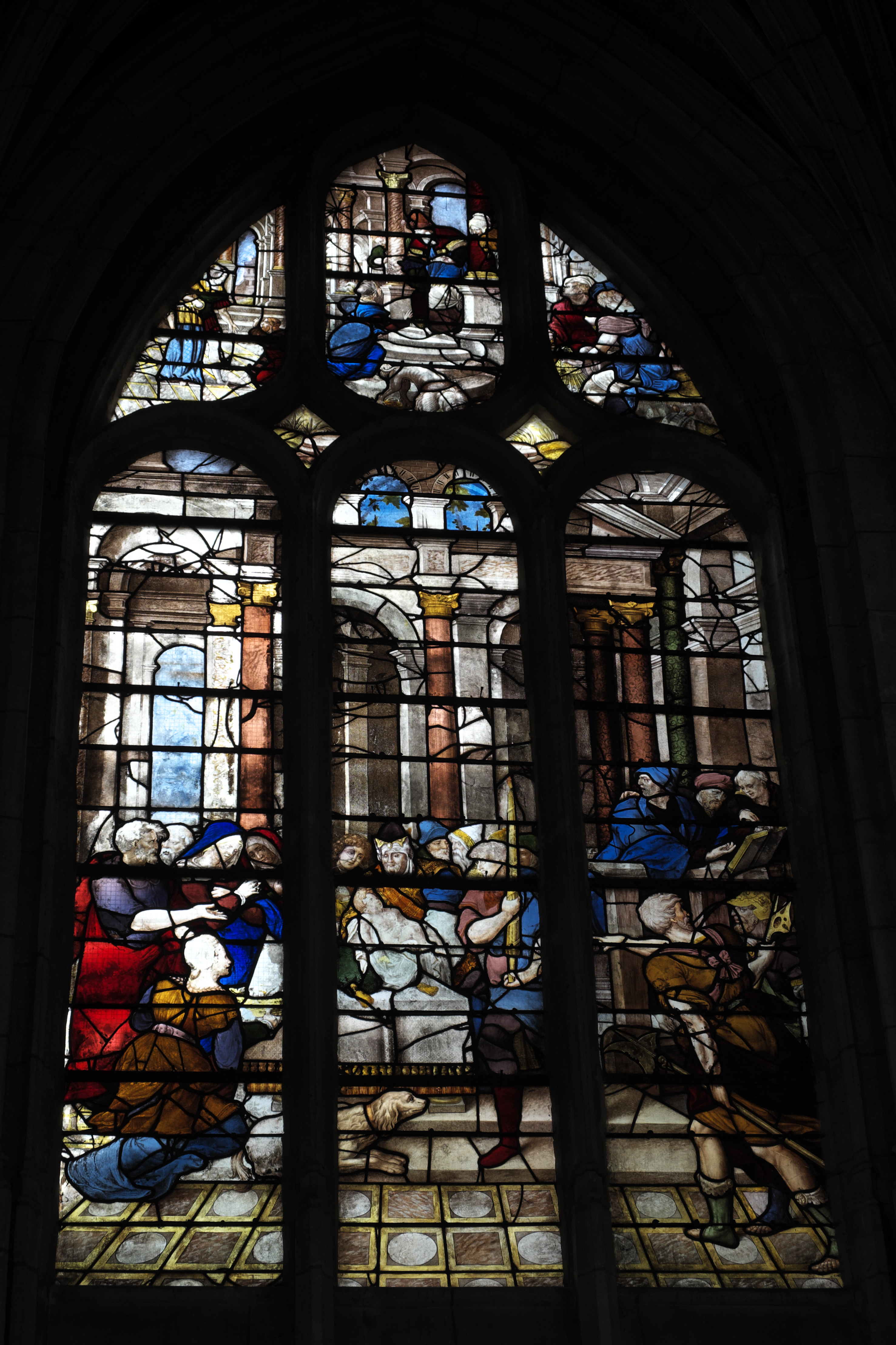 Katholische Kirche Sainte-Foy in Conches-en-Ouche im Département Eure (Haute-Normandie/Frankreich), Bleiglasfenster aus der 1. Hälfte des 16. Jahrhunderts; Darstellung: Geburt Marias